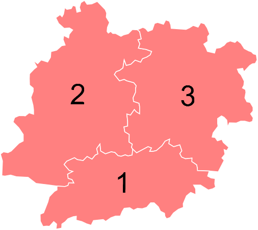 Résultats des élections législatives du Lot-et-Garonne en 2012